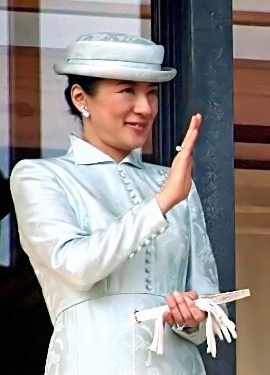 天皇誕生日の一般参賀で手を振る雅子妃